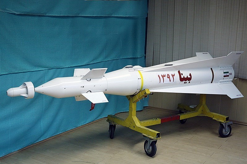 بینا - رونمایی از نسل جدید موشک بالستیک برد بلند